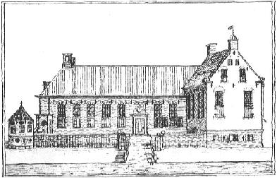 Nieuw Ontsta of Ontstaborg (1550-1560). In 1801 is de borg gesloopt.